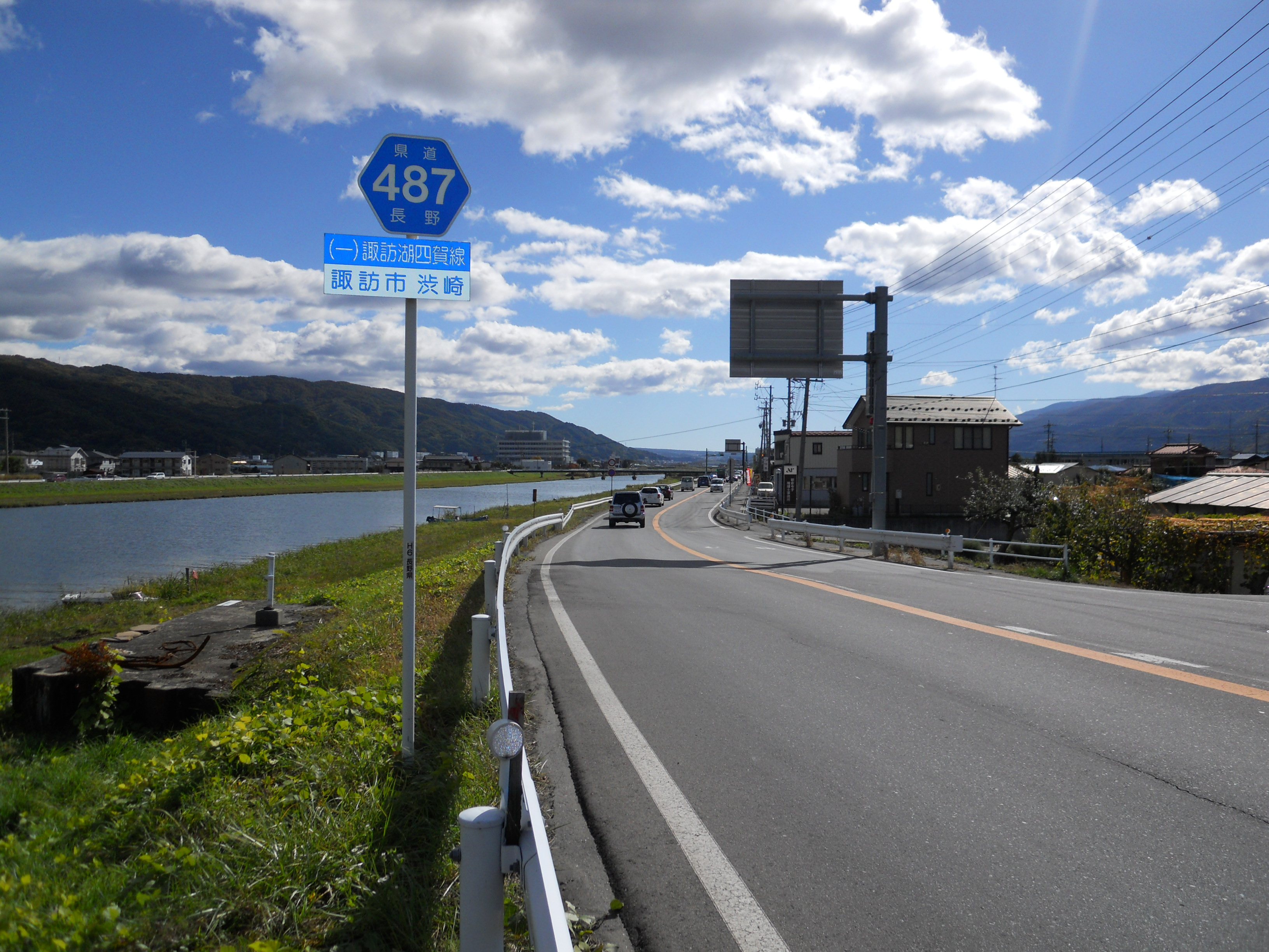 上川大橋交差点付近